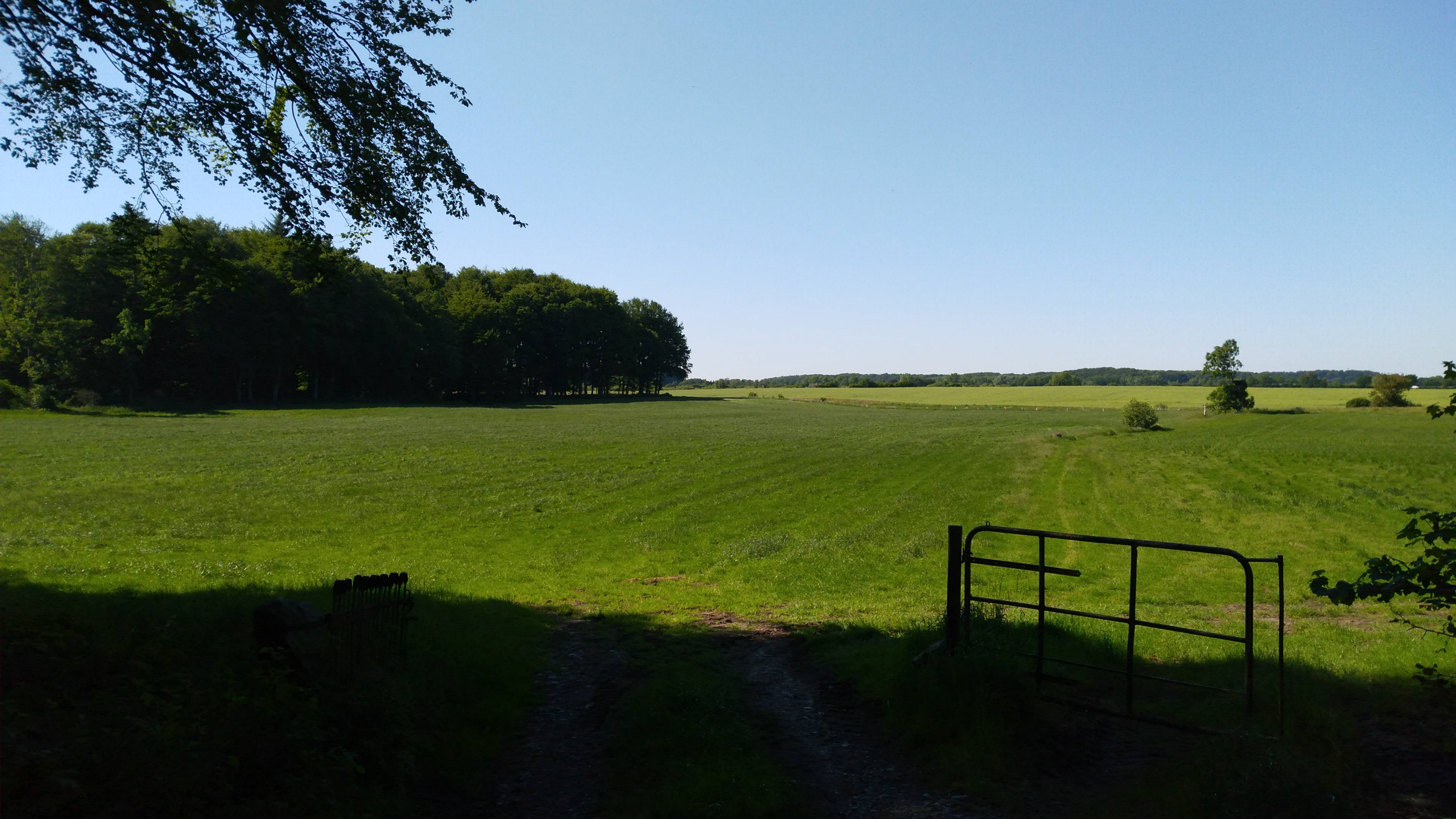 Ende des Forstweges in der Verlängerung von Satrupholm (Jagen 304)